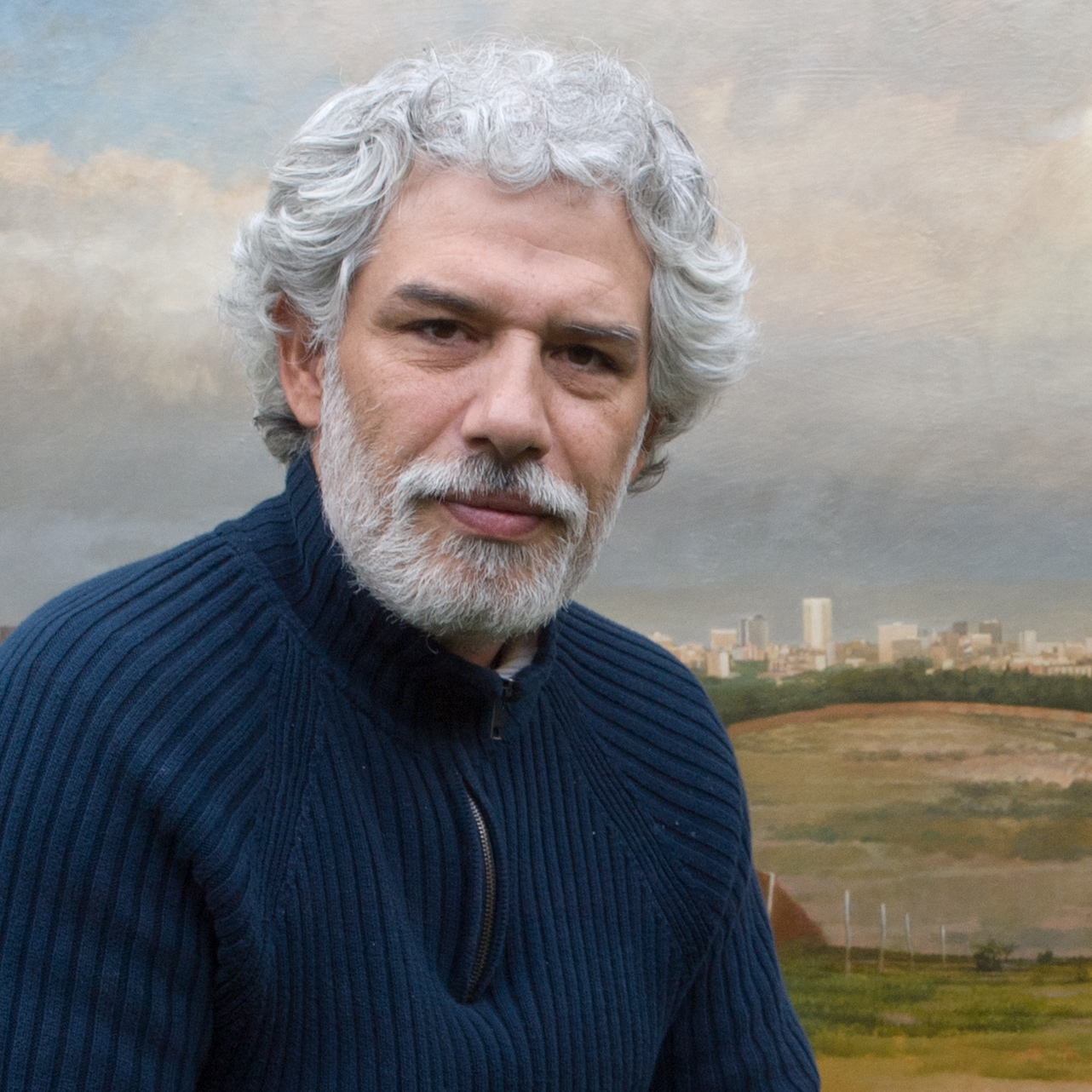 Pintor Aldo Bahamonde